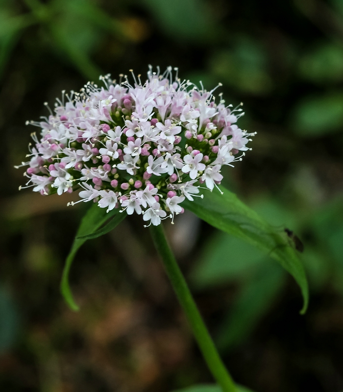 Alpengarten Villacher Alpe: vermutlich Berg-Baldrian